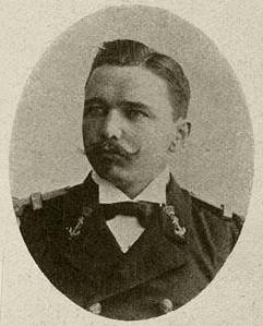 J.G.W.J. Eilerts de Haan (1865-1910); Dutch explorer